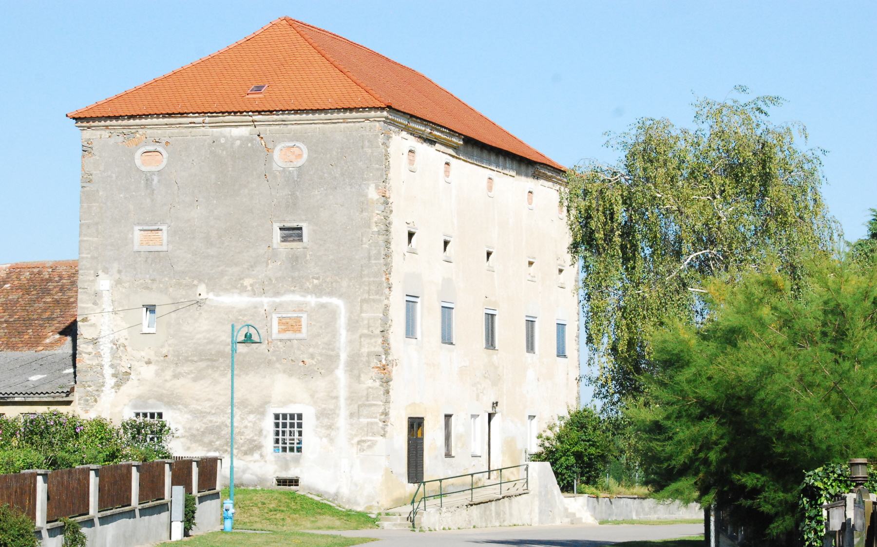 Schüttkasten (ehem. Gutshof)